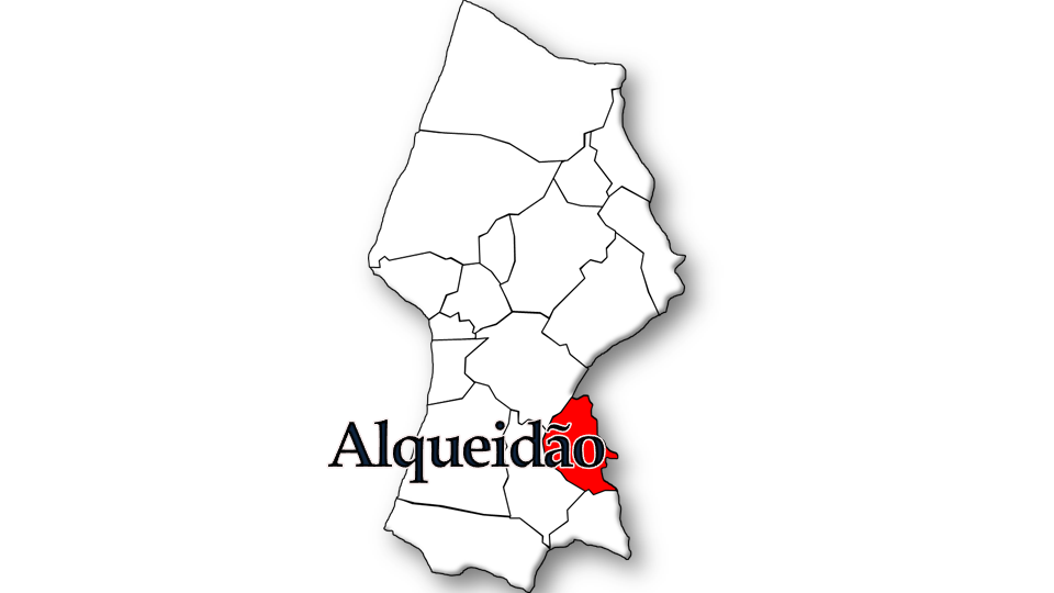 População